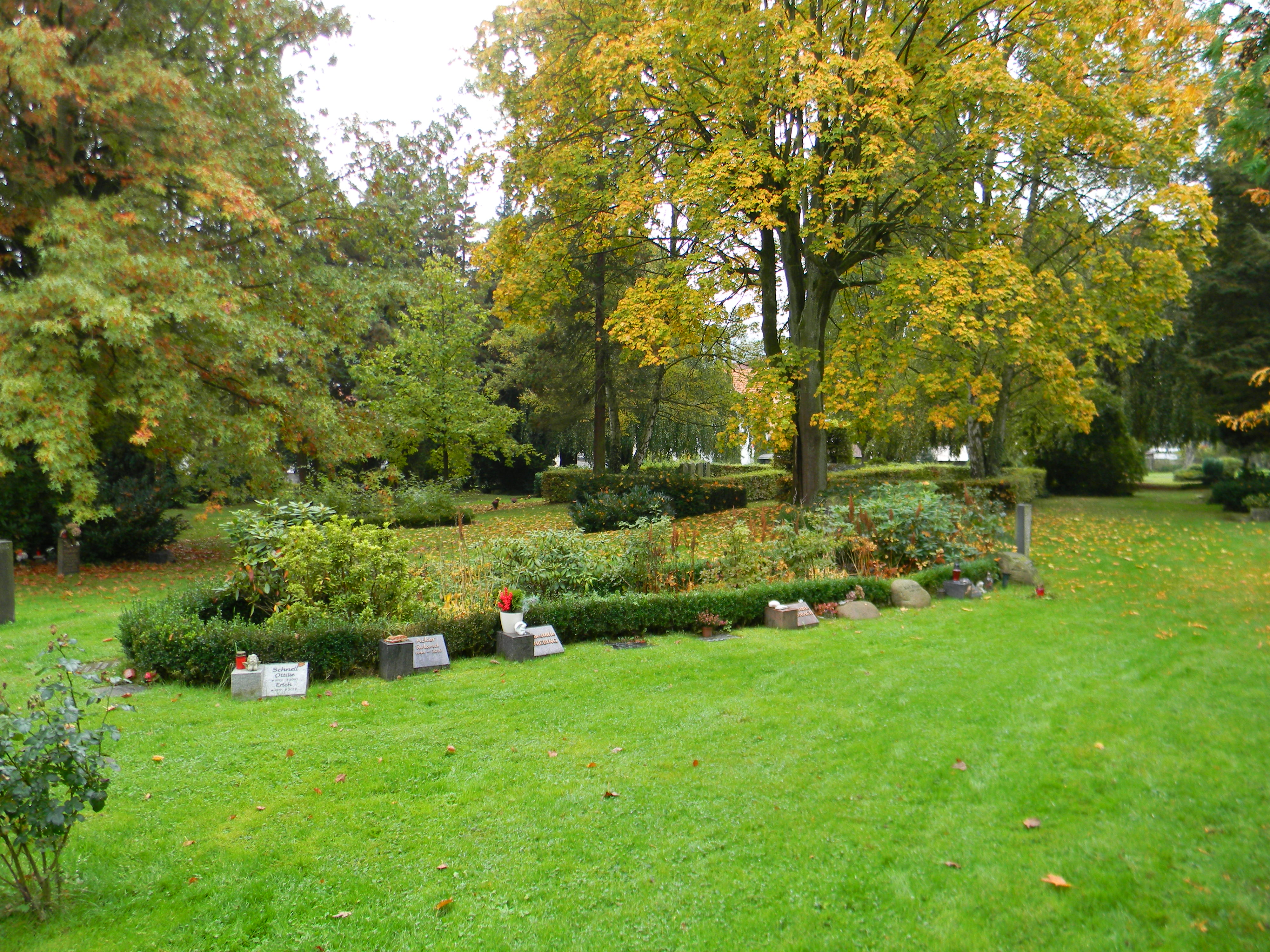 Urnenrasengräber auf dem Friedhof Neumünden in Hann. Münden (Landkreis Göttingen); eingebettet in einen Laubbaum-Bestand mit parkähnlichem Charakter.